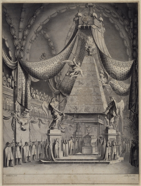 Castrum doloris för Ulrika Eleonora d. ä. 1693. Pennteckning in grått av Nikodemus Tessin d.y., utförd 1693.